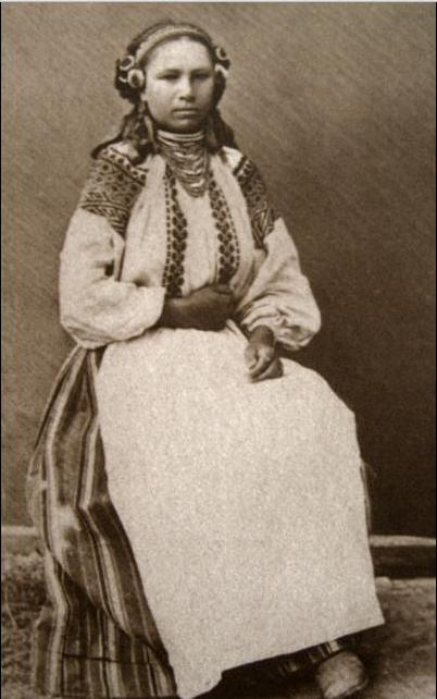 Дівчина з Поділля